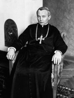 Biskup Kazimierz Tomczak